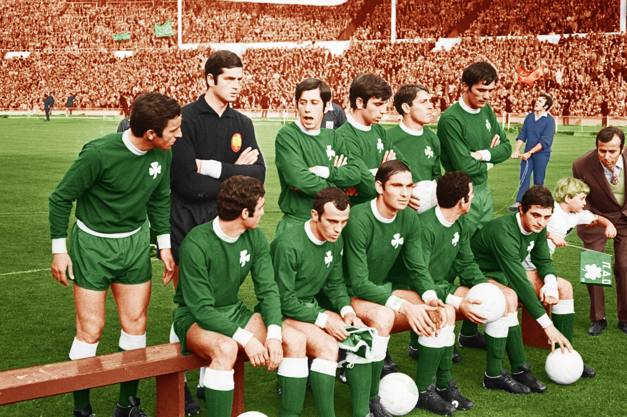 Elftal van Panathinaikos (colour edit by user Sportingn)